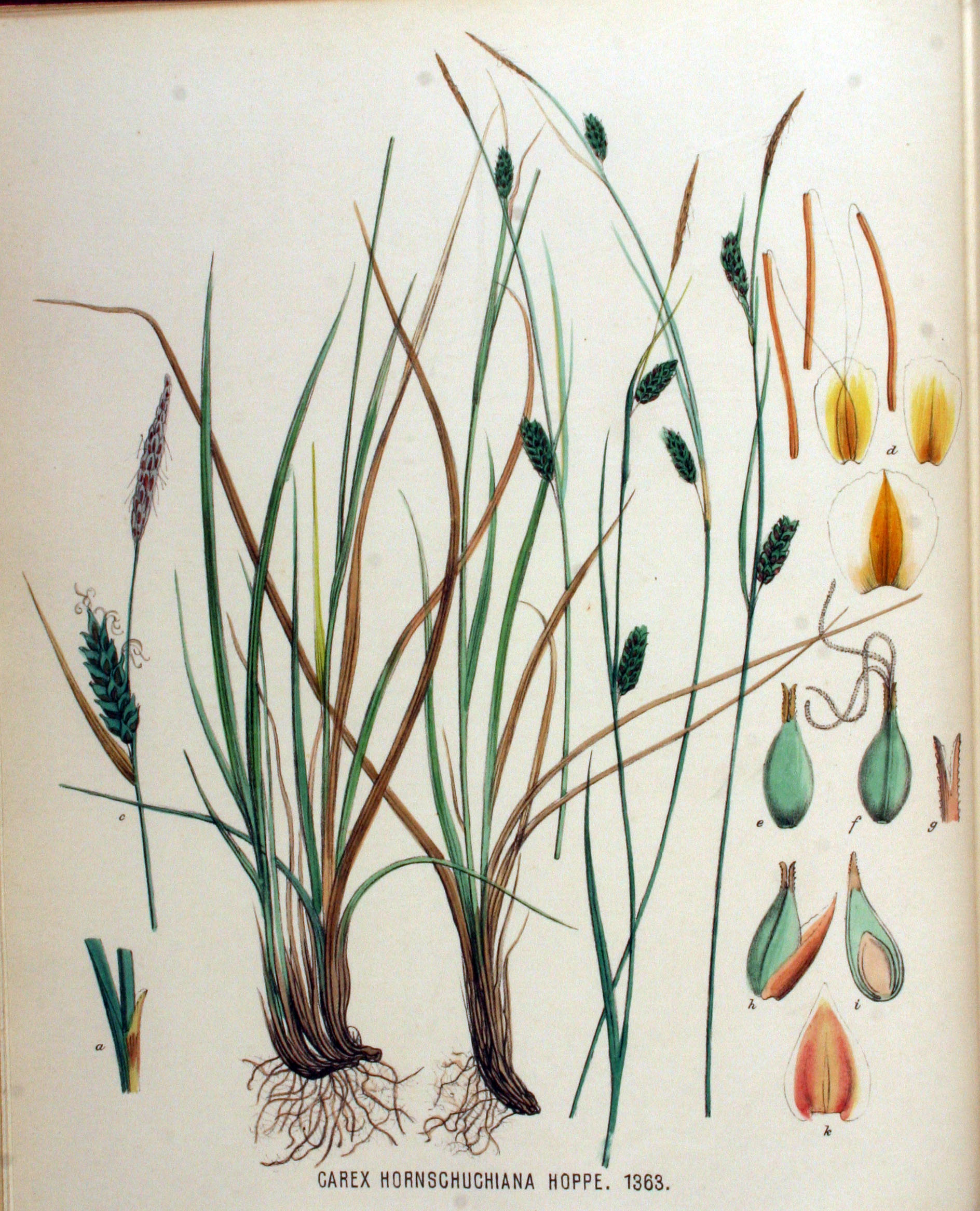 Carex hostiana DC. (Syn. Carex hornschuchiana Hoppe)